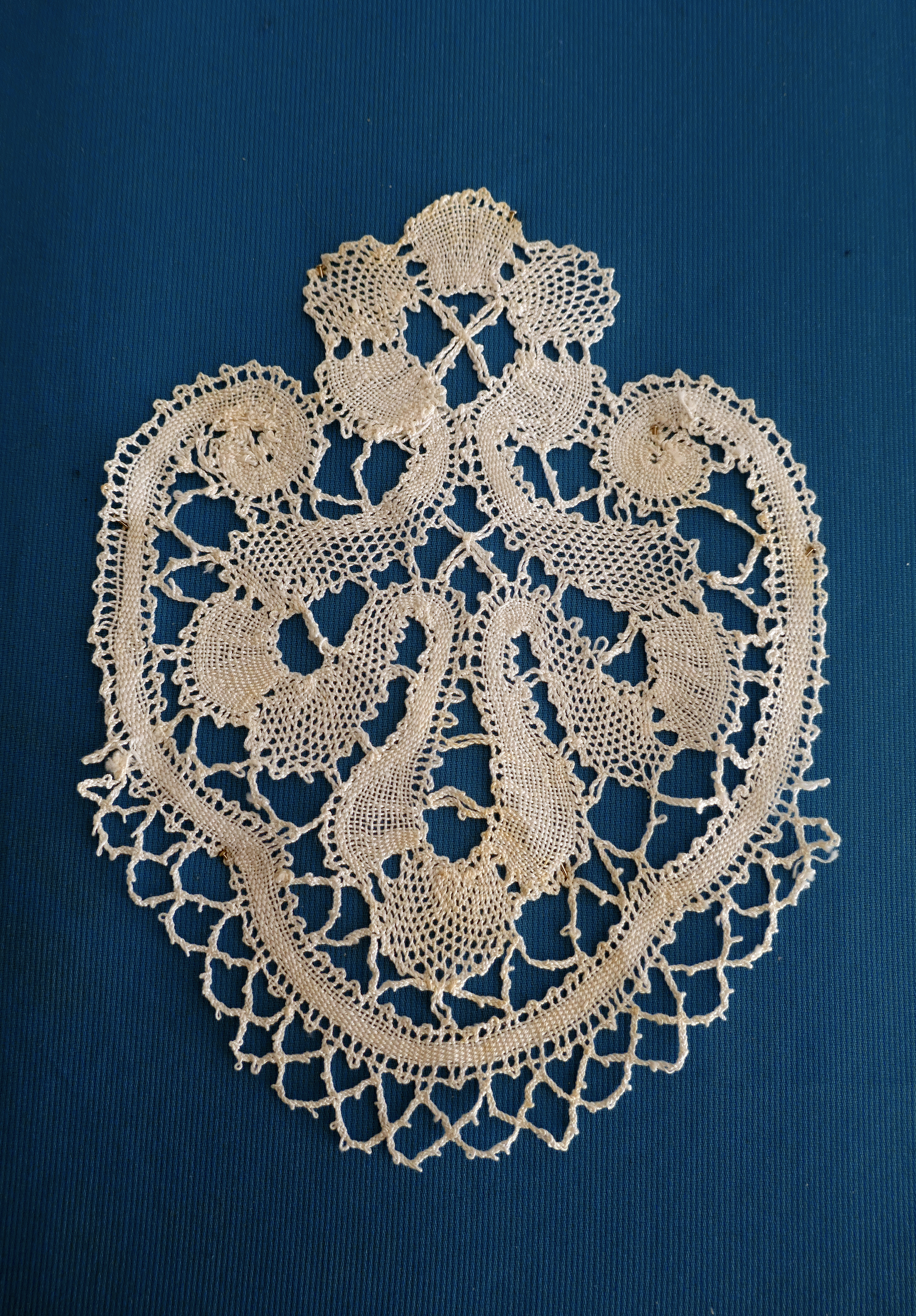 Motif de dentelle de Mirecourt (Vosges, France) Maison de la musique mécanique et de la dentelle à Mirecourt